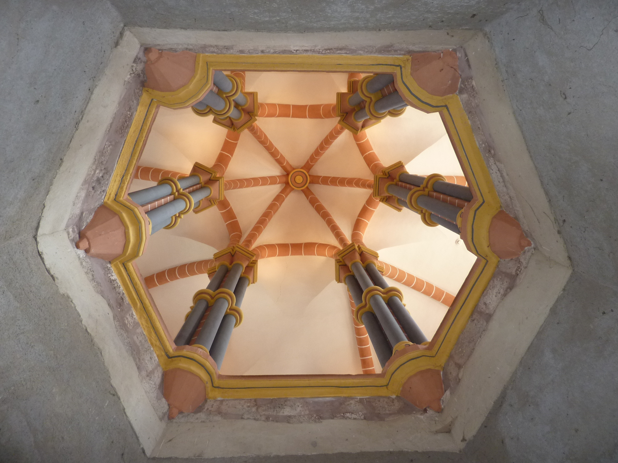 Chapel of Vianden castle